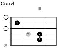 Eigenanfertigung